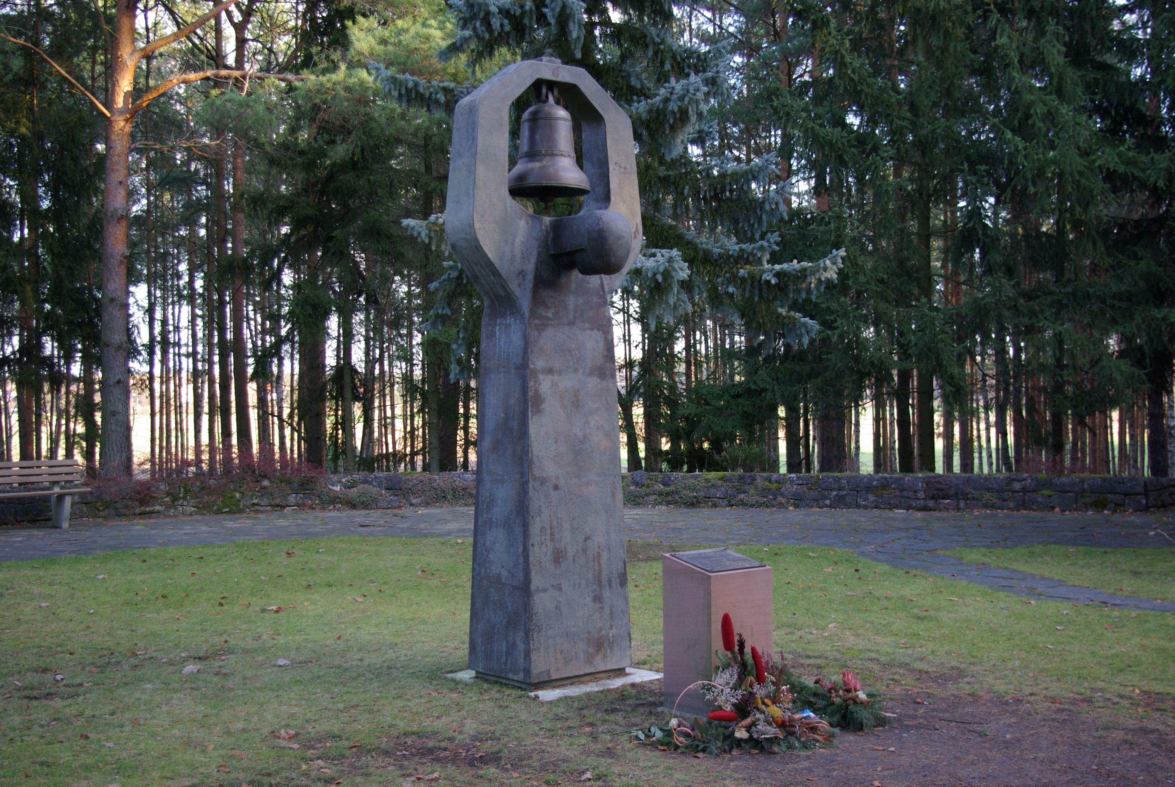 Der Waldfriedhof in Halbe, Brandenburg, Deutschland, die Glockenplastik